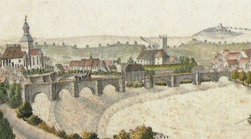 Die Lauffener Neckarbrücke um 1800